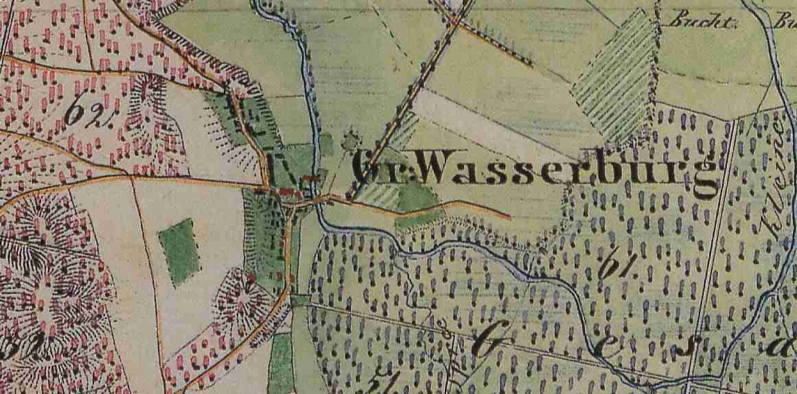 Groß Wasserburg, Ortsteil der Gemeinde Krausnick-Groß Wasserburg, Lkr. Dahme-Spreewald, Brandenburg, Deutschland, Ausschnitt aus dem Urmesstischblatt 3949 Schlepzig von 1841